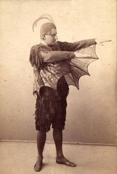 Madách Imre: AZ Ember tragédiája. Nemzeti Színház. Bemutató: 1883/09/21. Rendező: Paulay Ede. Lucifer: Gyenes László